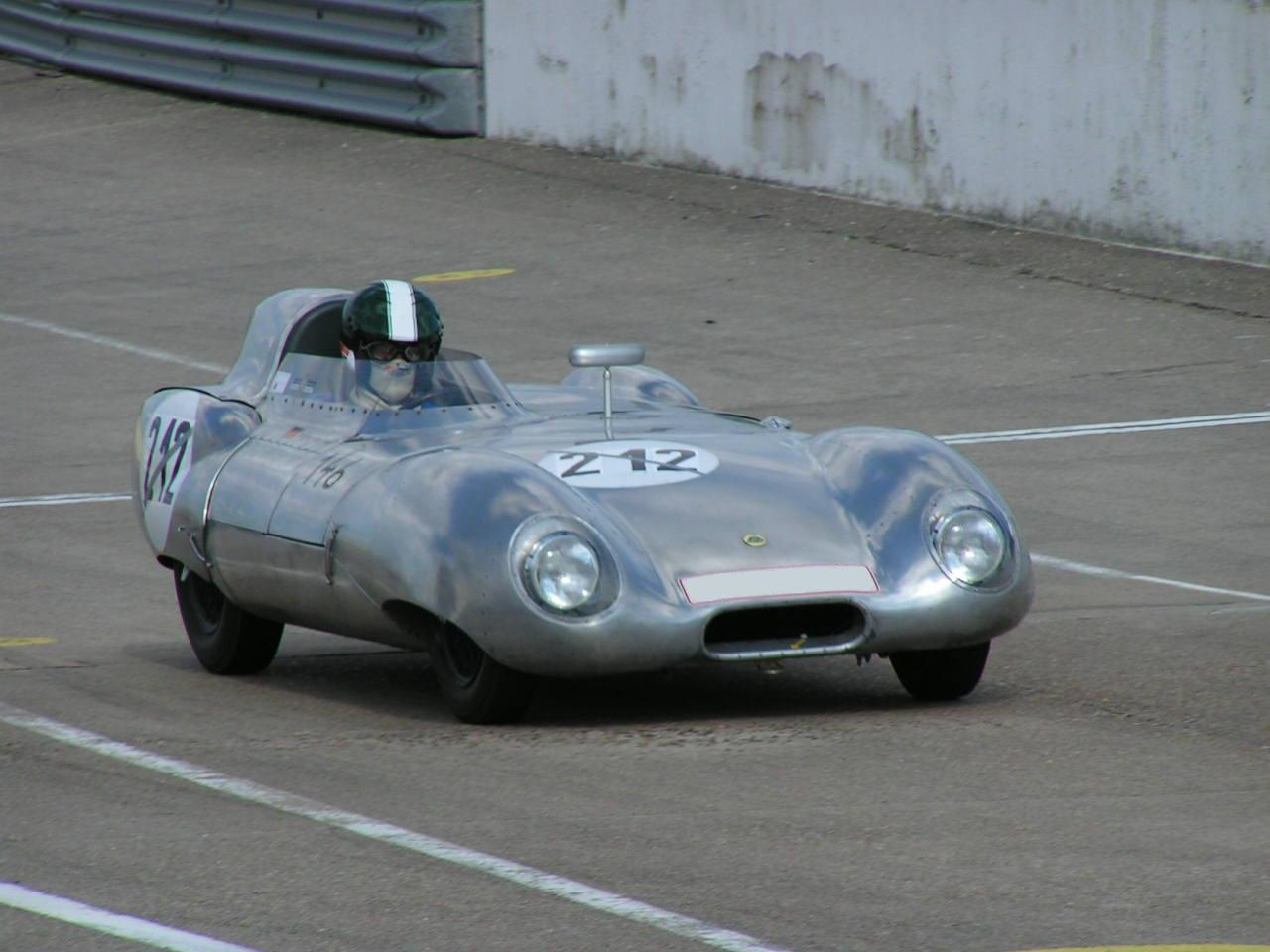 Lotus XI LeMans in Montlhery 2004